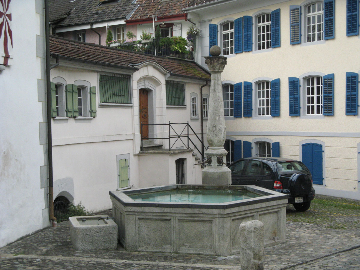 Zeughausbrunnen in Bremgarten